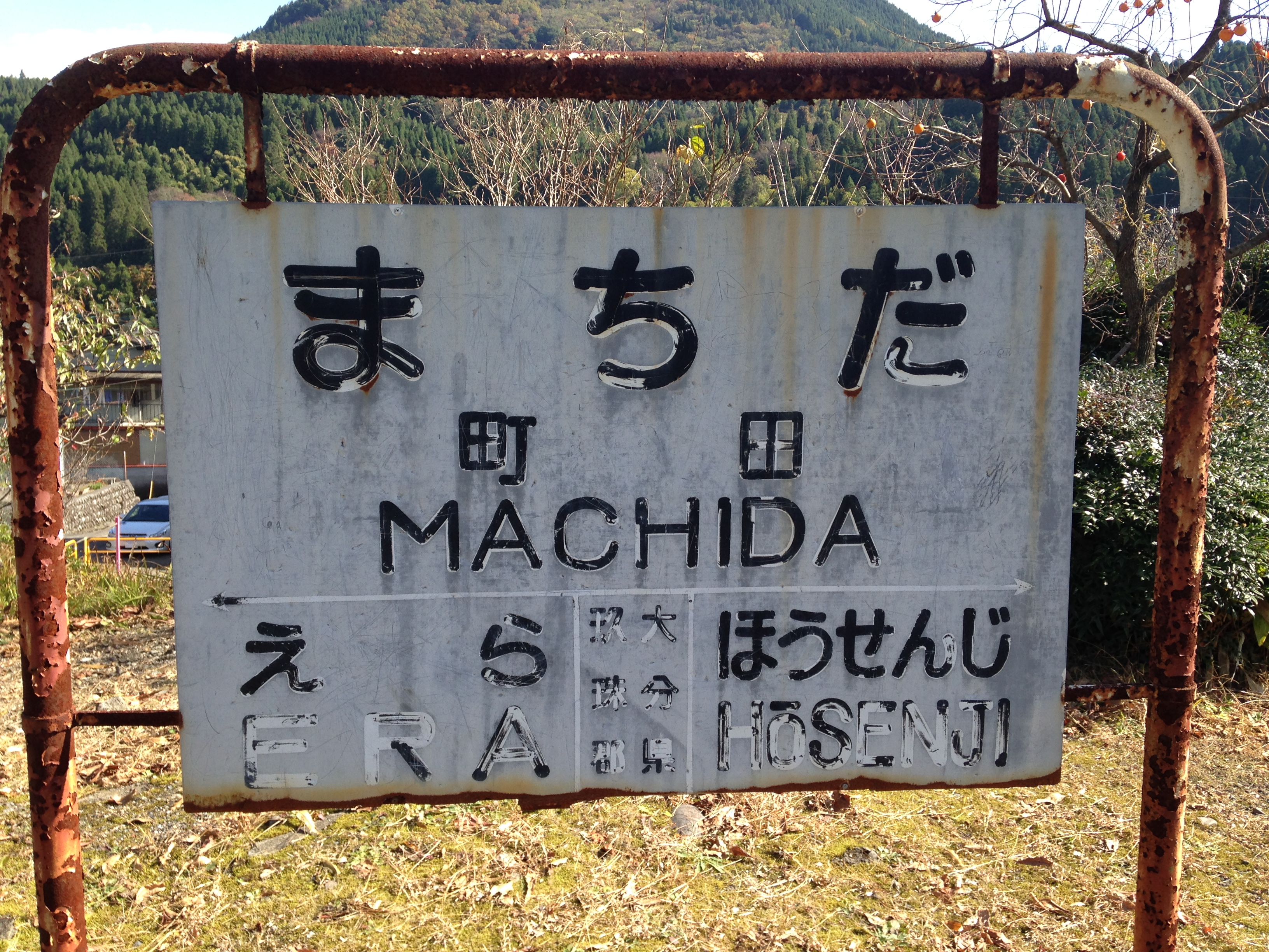 旧・町田駅(大分県)の駅名標